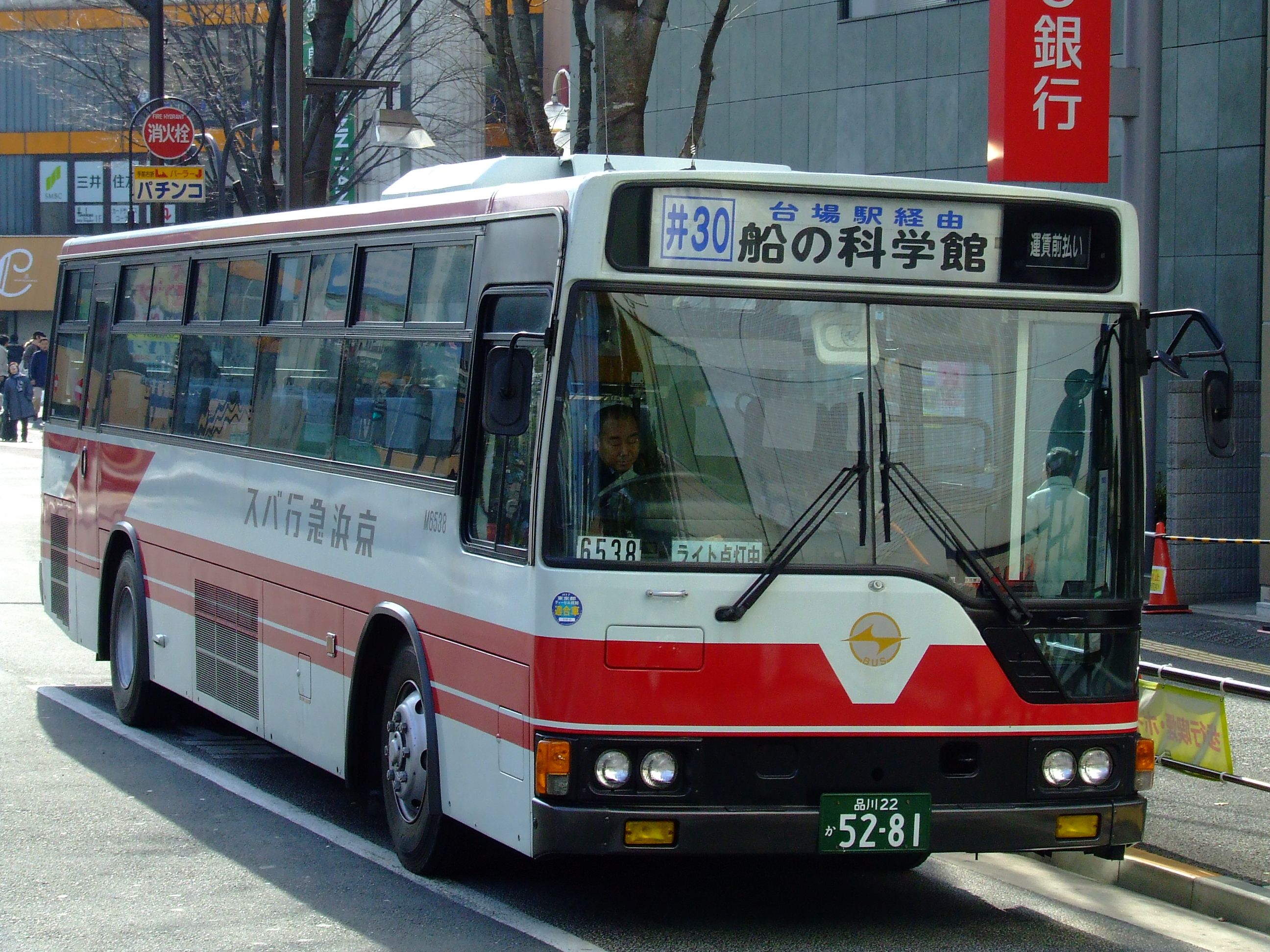 京浜急行バス大森営業所M6538号車 「ワンロマ」と通称される路線・貸切兼用車であり、大森営業所では井30系統などの首都高速湾岸線経由路線でもよく使用された。